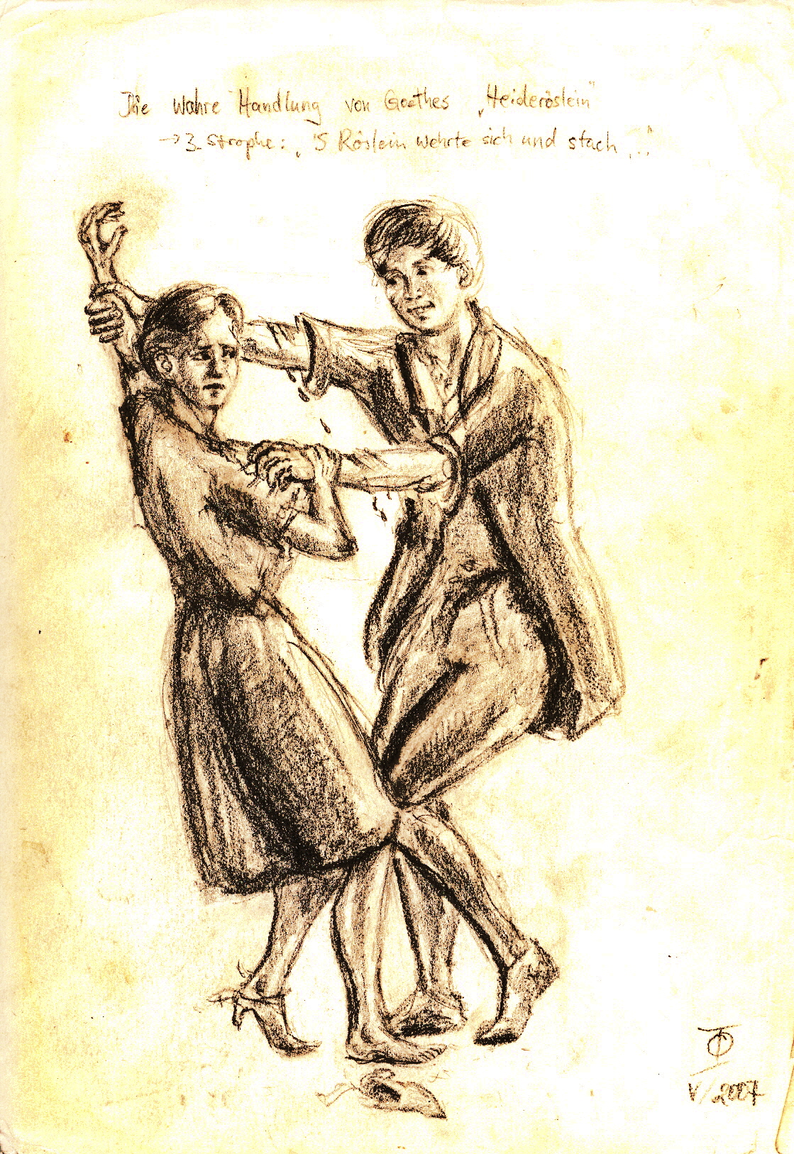 Zeichnerische Interpretation zum Heiderösleinlied